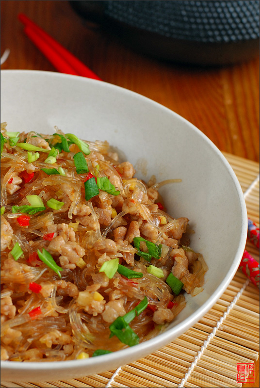 китайское блюдо